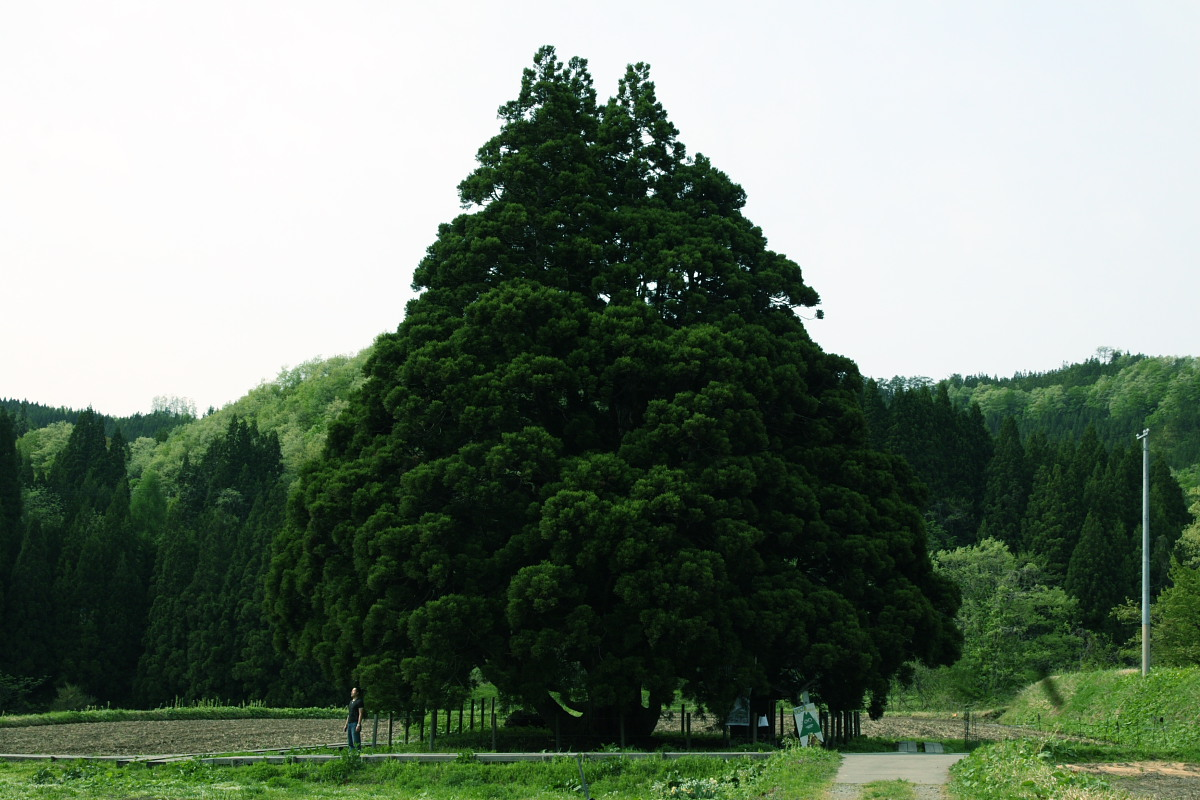 山形県鮭川村にあるトトロの木